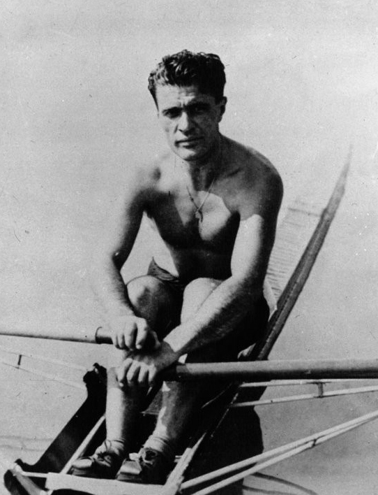 Championnats d'Europe d'aviron à Belgrade : l'italien Mariari, gagnant du skiff : [photographie de presse] / Agence Mondial